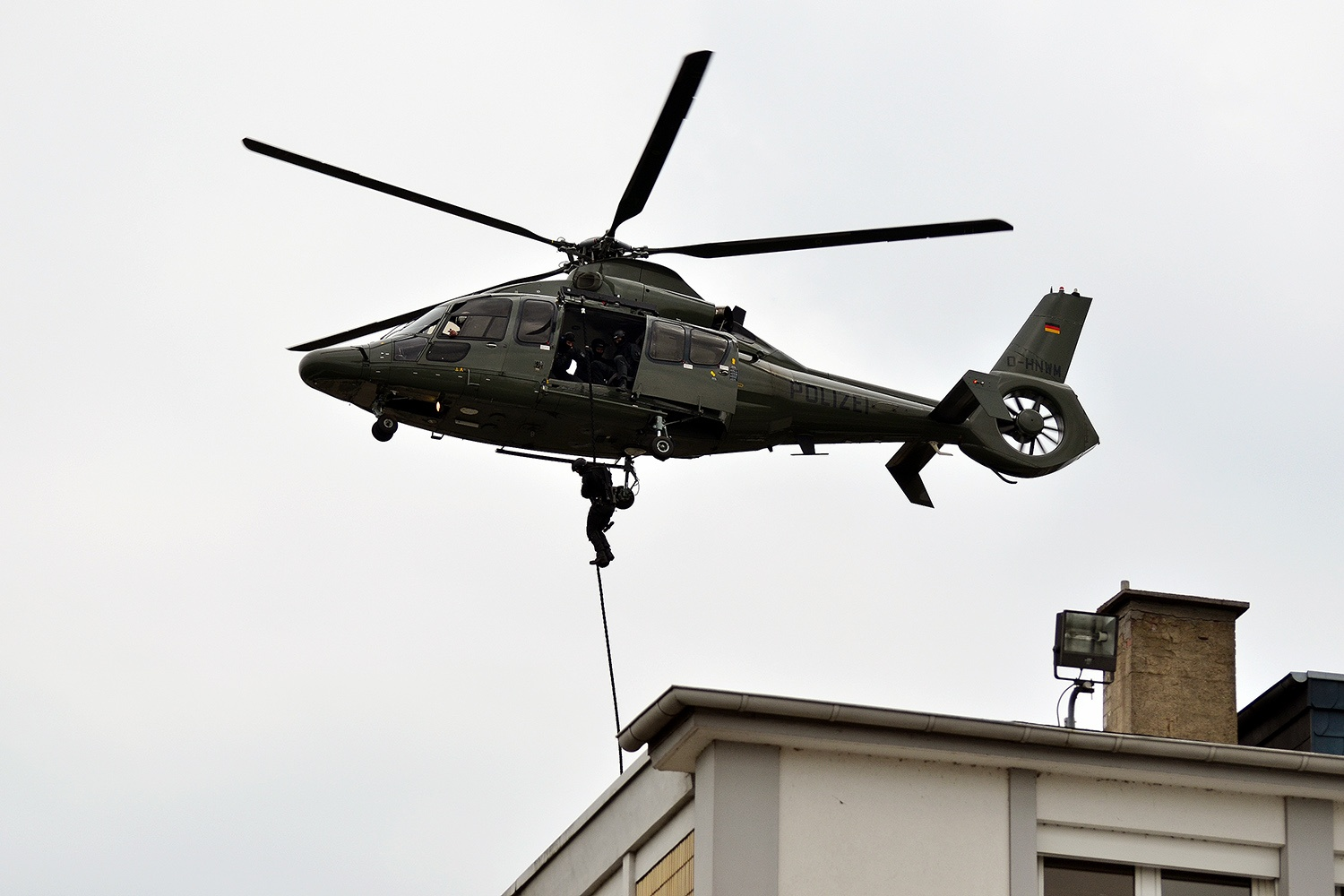 Landespolizeifest NRW 2013, Dortmund, Datum/Uhrzeit: 13.07.2013 12:31:30